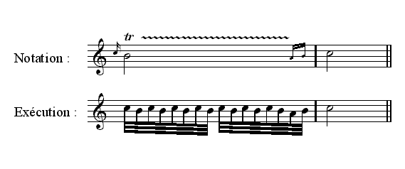 Description : Trille Source : Personnelle Licence : GFDL